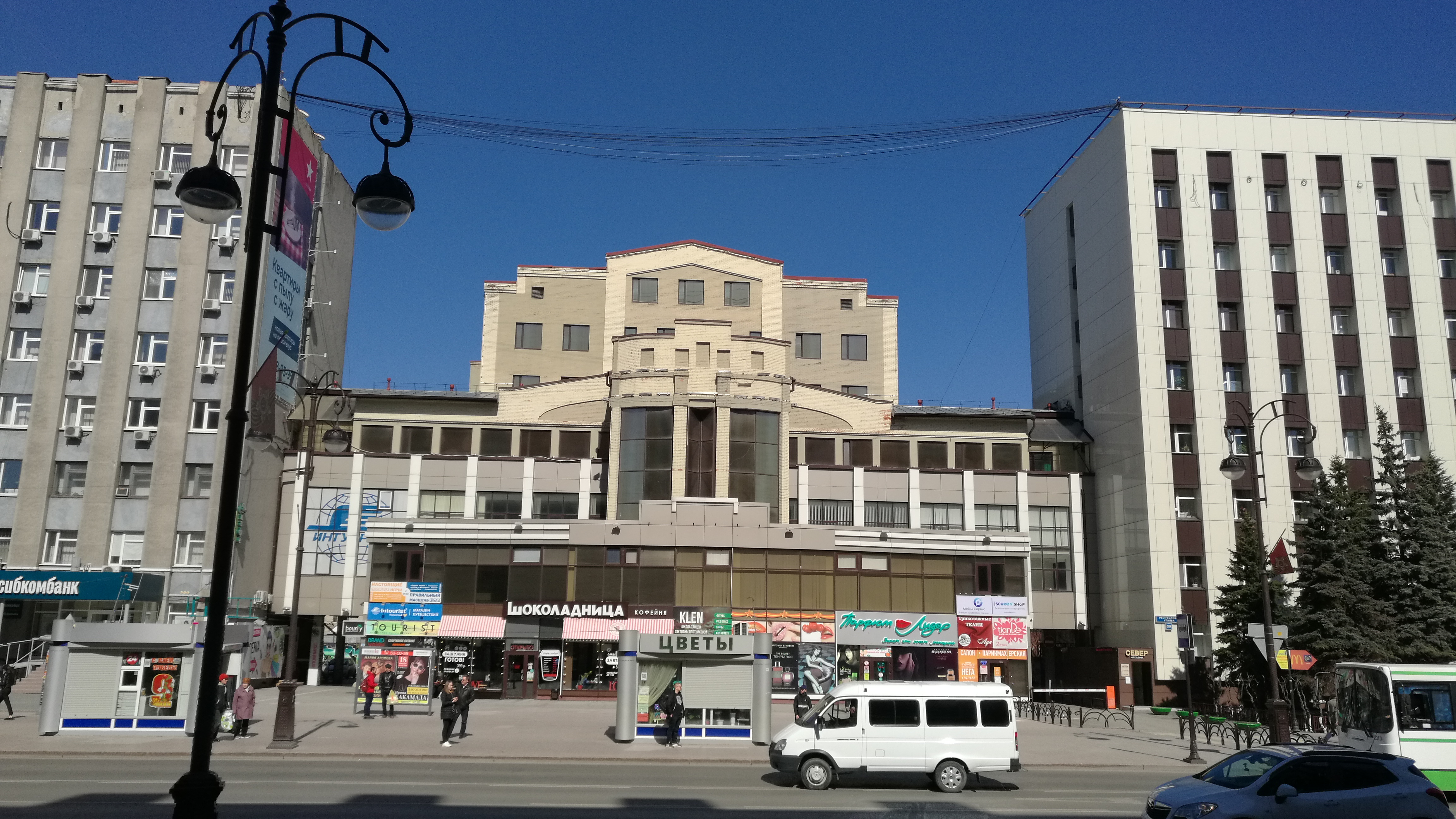 Strato Respubliko. Tjumeno, Rusio.